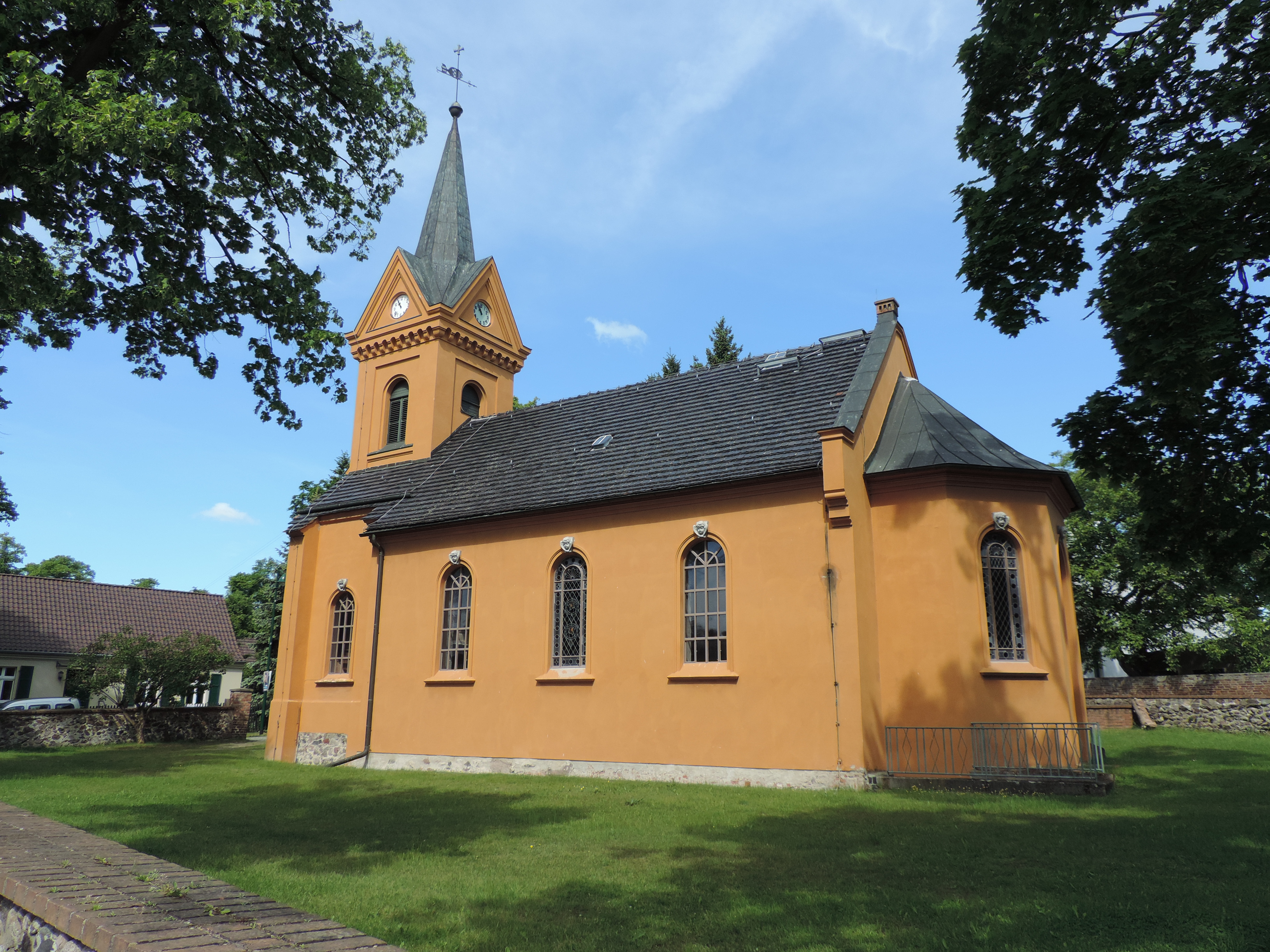 Dorfkirche Rangsdorf - Germany